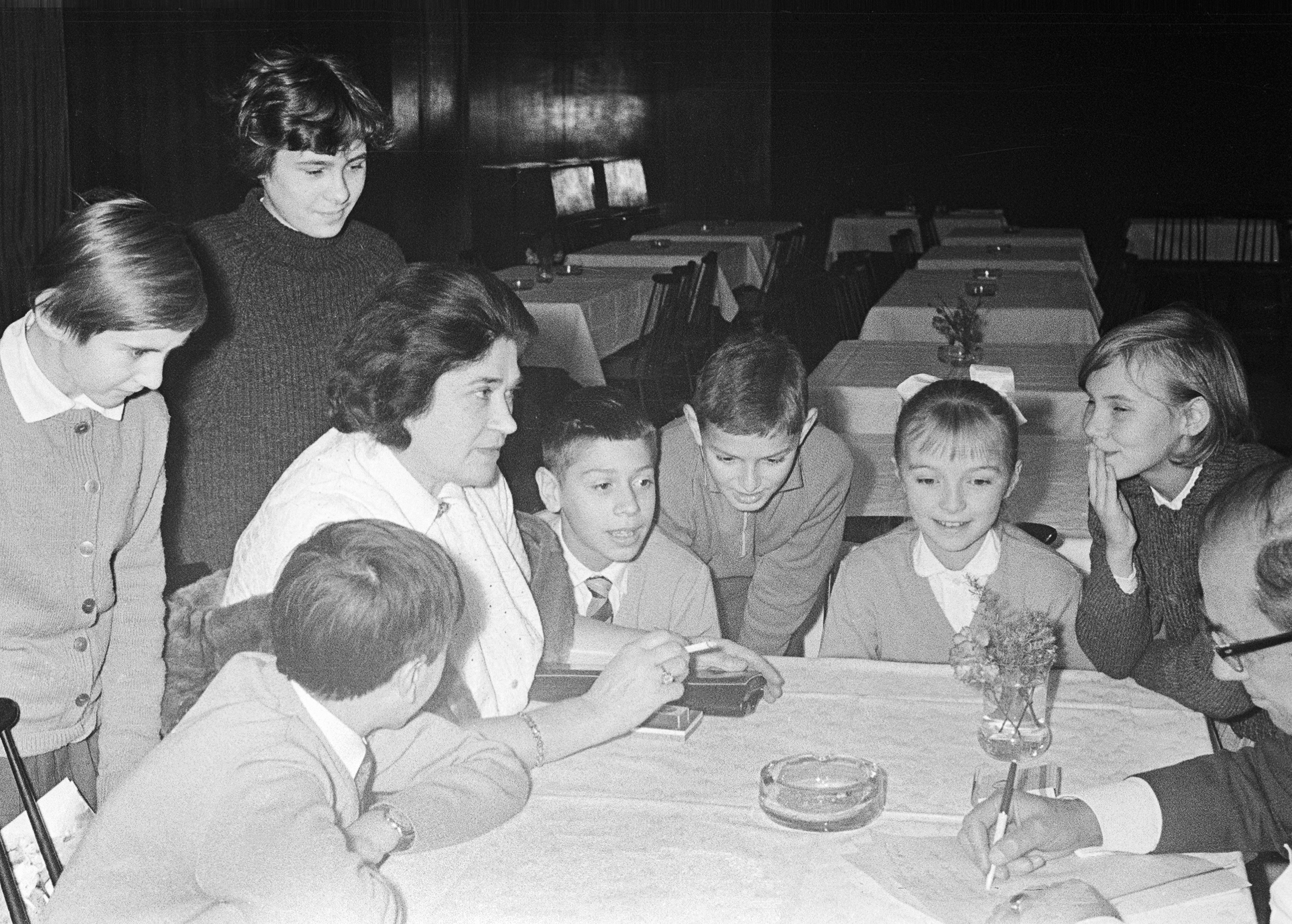 Po premieri filma Srečno Kekec. Od leve sedijo: Velimir Djurin (Kekec), Ruša Bojčeva (Pehta), Martin Mele (Rožle) in Blanka Florjanc (Mojca)